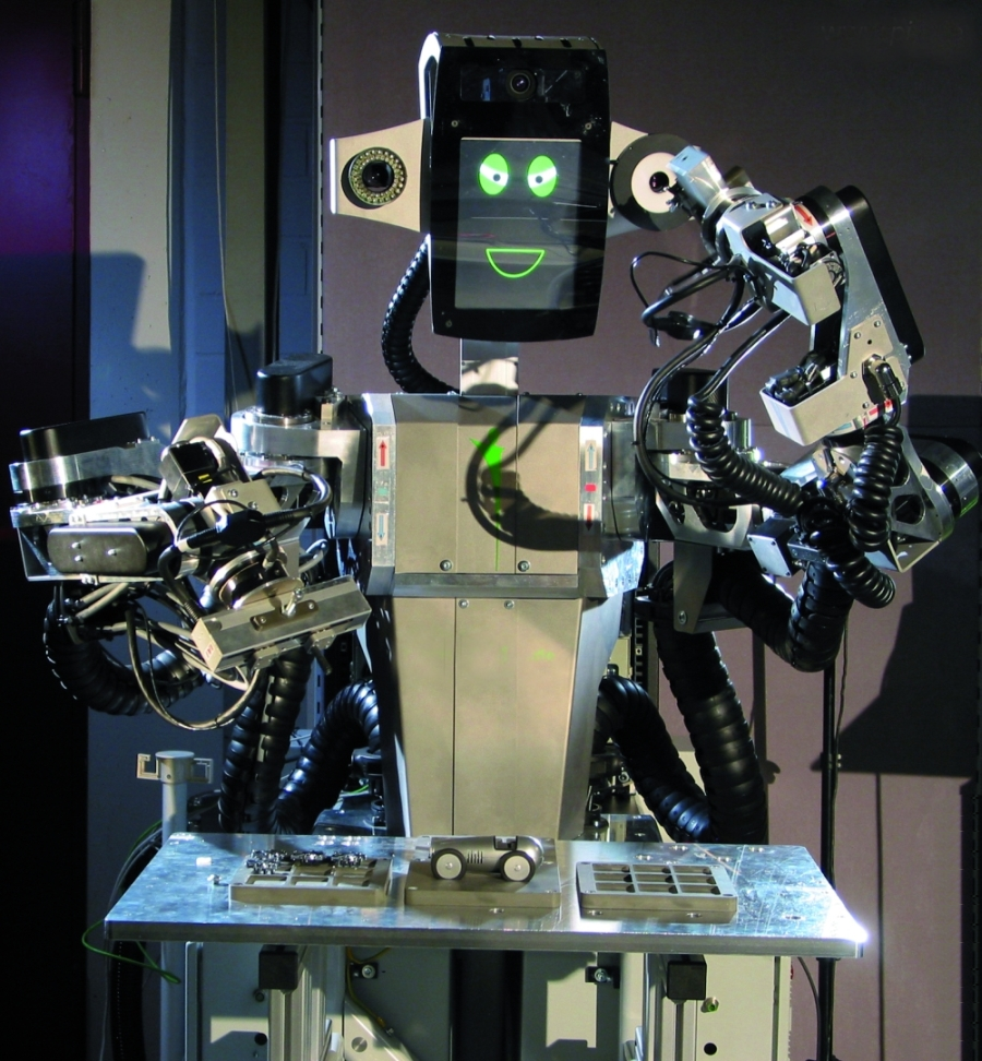 Der Workerbot von pi4 robotics.